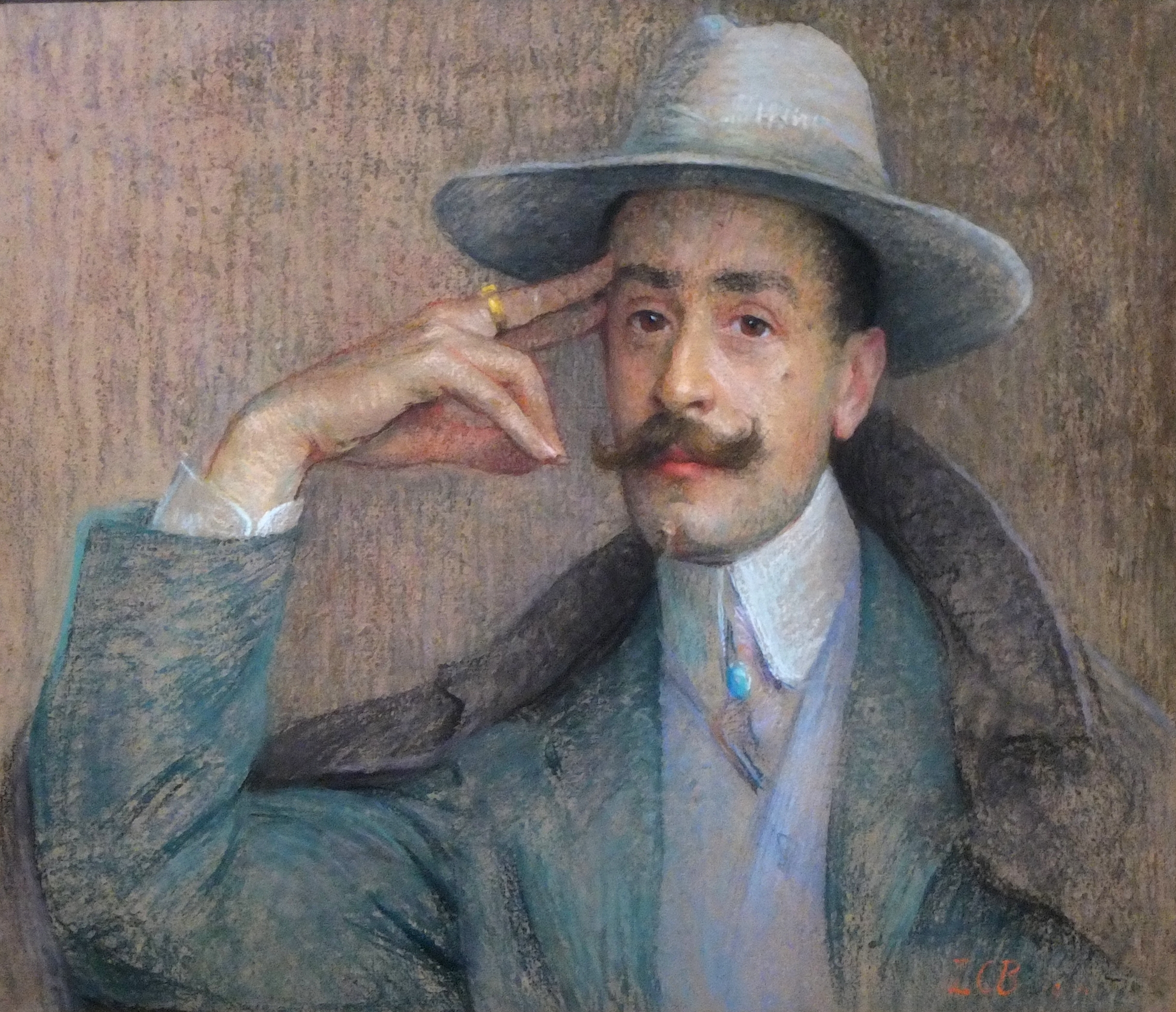 Gabriel de Yturri, pastel de Louise-Catherine Breslau, 1904. Musée Lambinet, Versailles, Inv : 318. Exposé lors de l'exposition Versailles revival, 1867-1937 (19 novembre 2019 - 15 mars 2020)